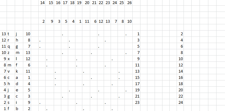 Рисунок, описывающий шифр